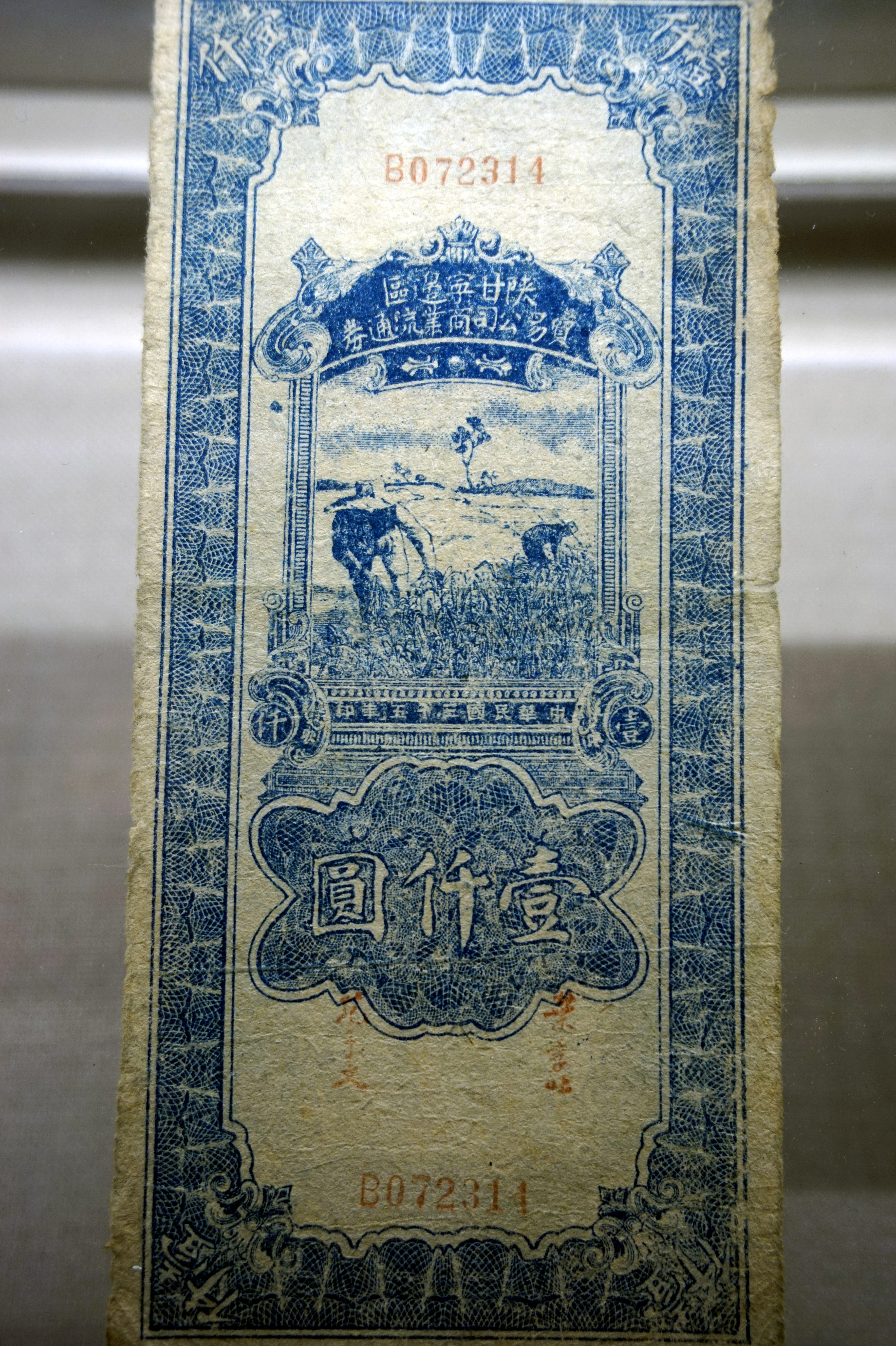 陕甘宁边区贸易公司一千元商业流通券。中国财税博物馆藏。